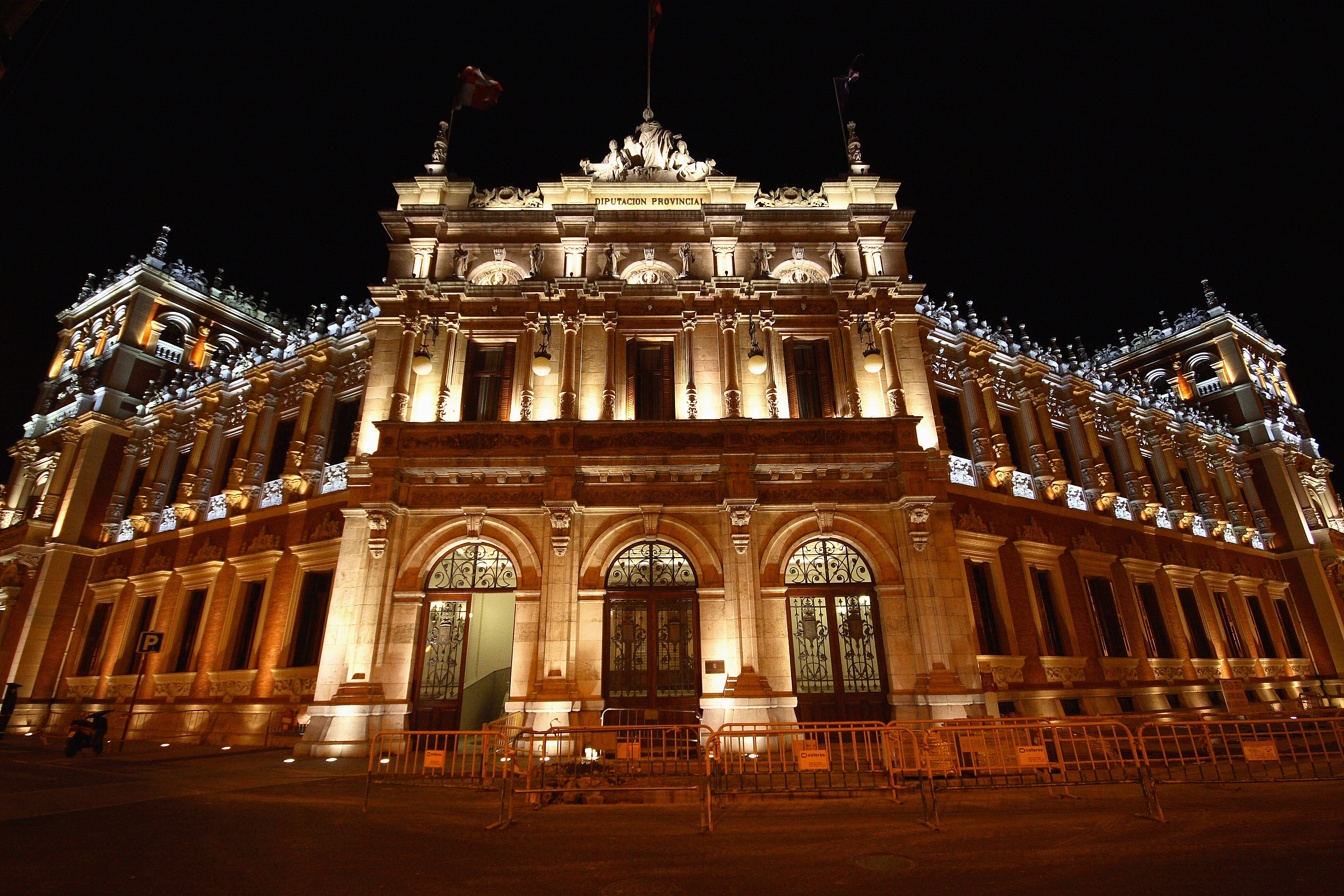 Diputación de Palencia, España. Canon 30D+ Sigma 10-20mmEX ISO800